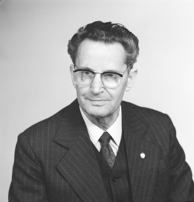 ADN-ZB Brüggemann 12.6.86 Berlin: Alois Pisnik, Mitglied des Staatsrates der DDR, Mitglied des ZK der SED, Elektro- und Maschinenschlosser, 74 Jahre